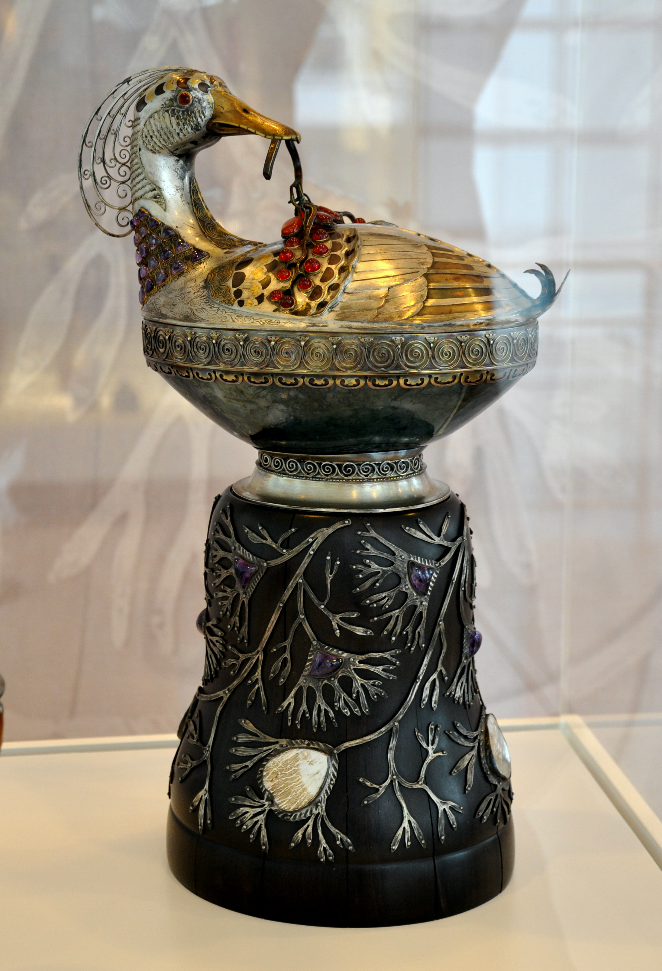 Ernst Riegel: Deckelschale in Form einer Ente, Darmstadt, 1911. Schale: Silber teilvergoldet, Gold- und Kupfertauschierung, Messing, Filigran, Moos-Achat, Amethyste und Karneole; Sockel: Ebenholz, Silber, Perlmutt, Amethyst. Museum für Angewandte Kunst Frankfurt am Main, Inv. Nr. St. 248 (Dauerleihgabe der Stadt Frankfurt).